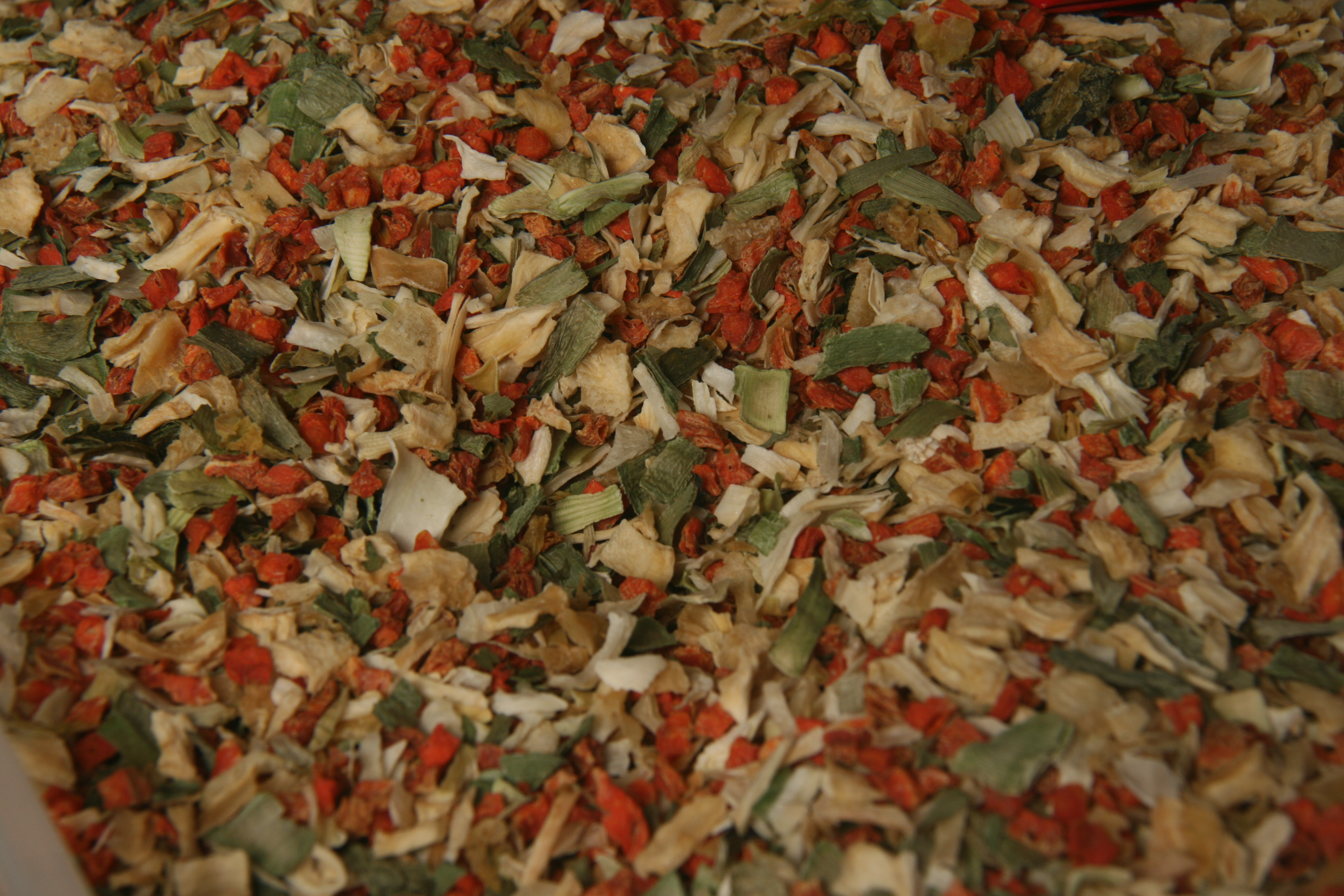 Sopa juliana seca , antes de ser cocinada (sin patata)